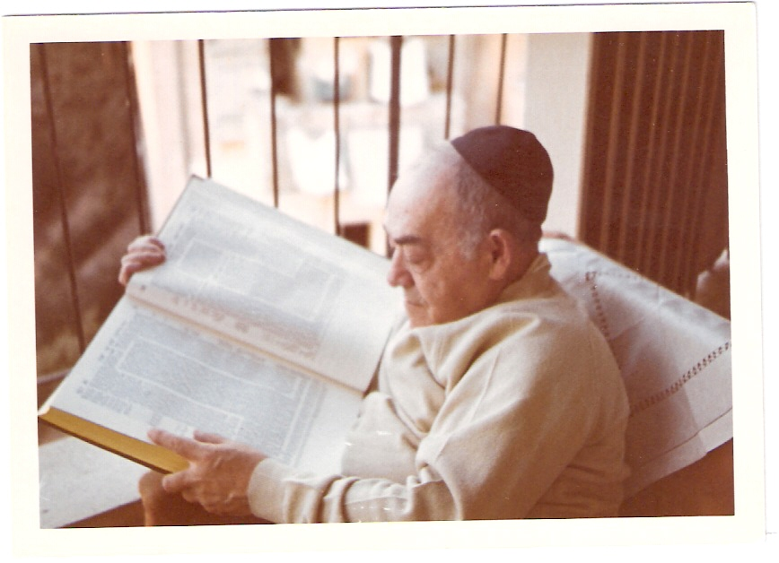 יצחק אבינרי בלשן ולשונאי שר הלשון העברית